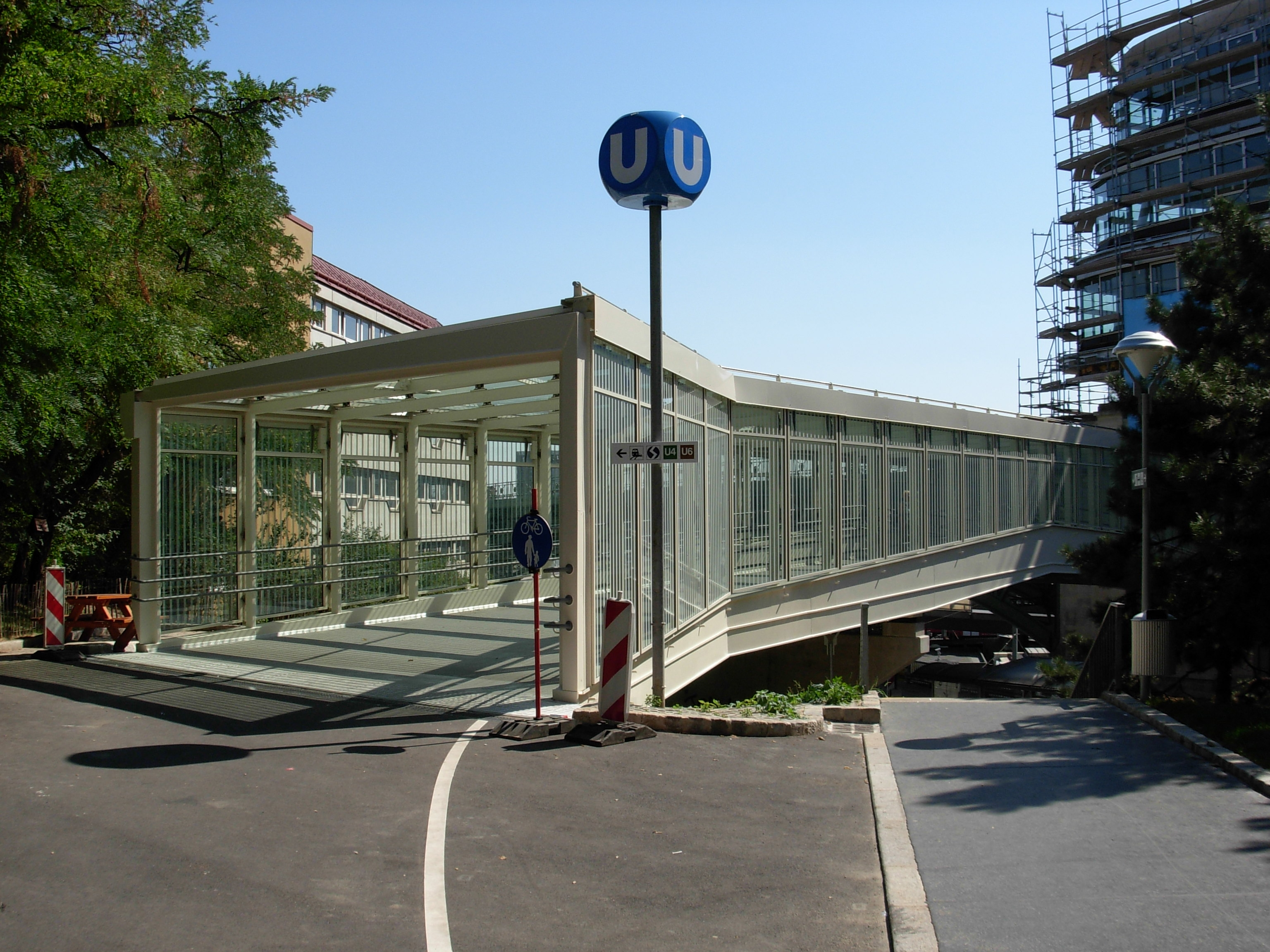 Skywalk Spittelau Aufgang Guneschgasse